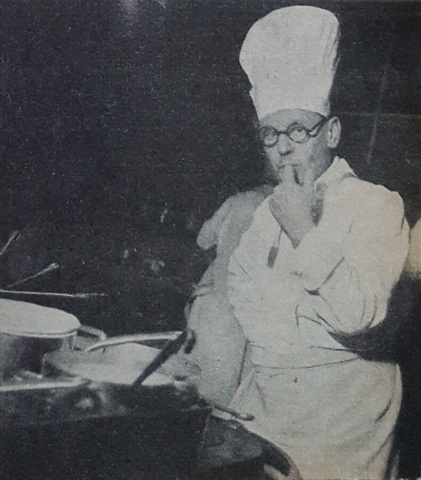 Köksmästare Albert Köhl på Strand Hotell i Stockholm